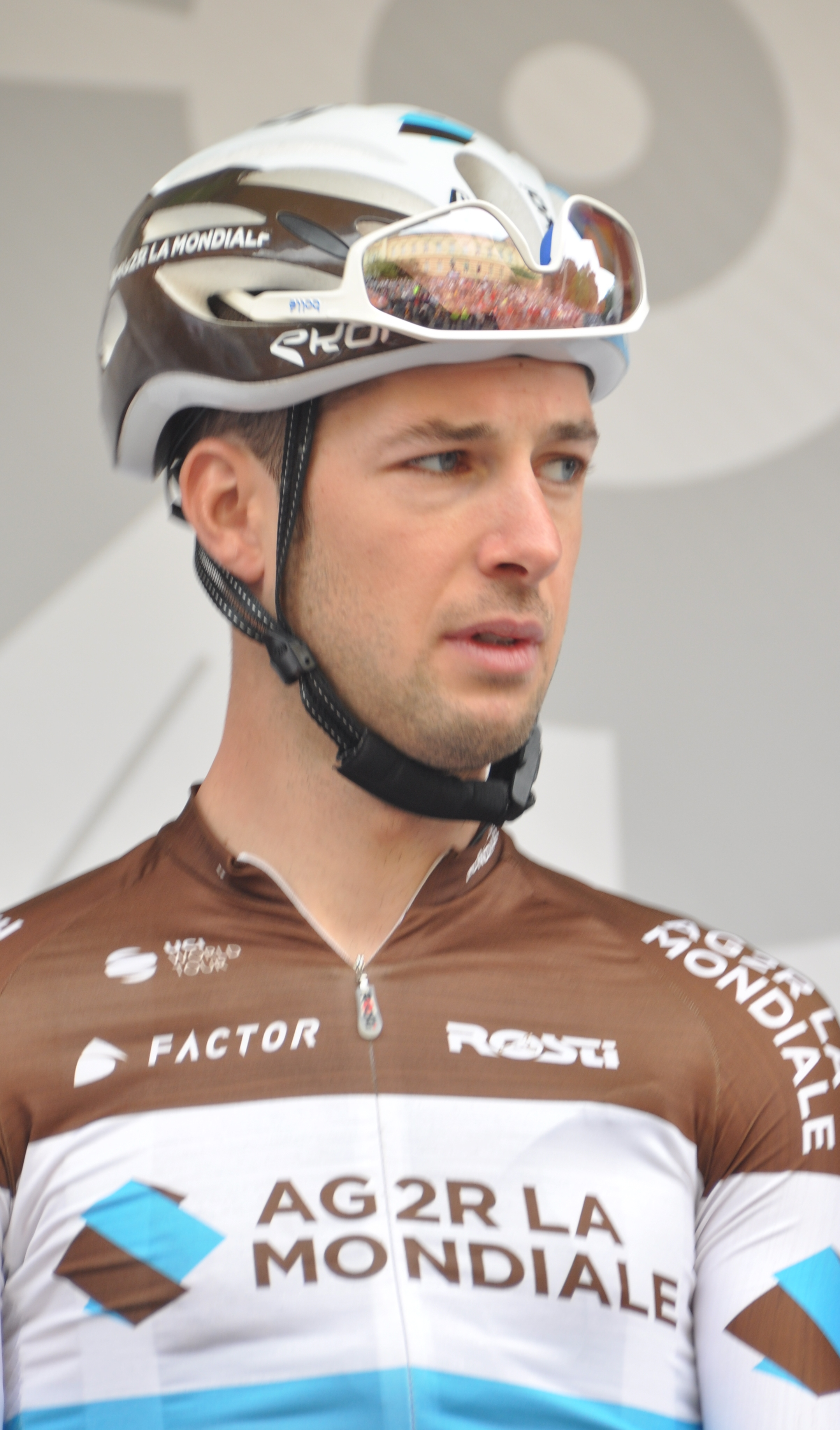 François Bidard, französischer Radrennfahrer - Beschreibung prüfen